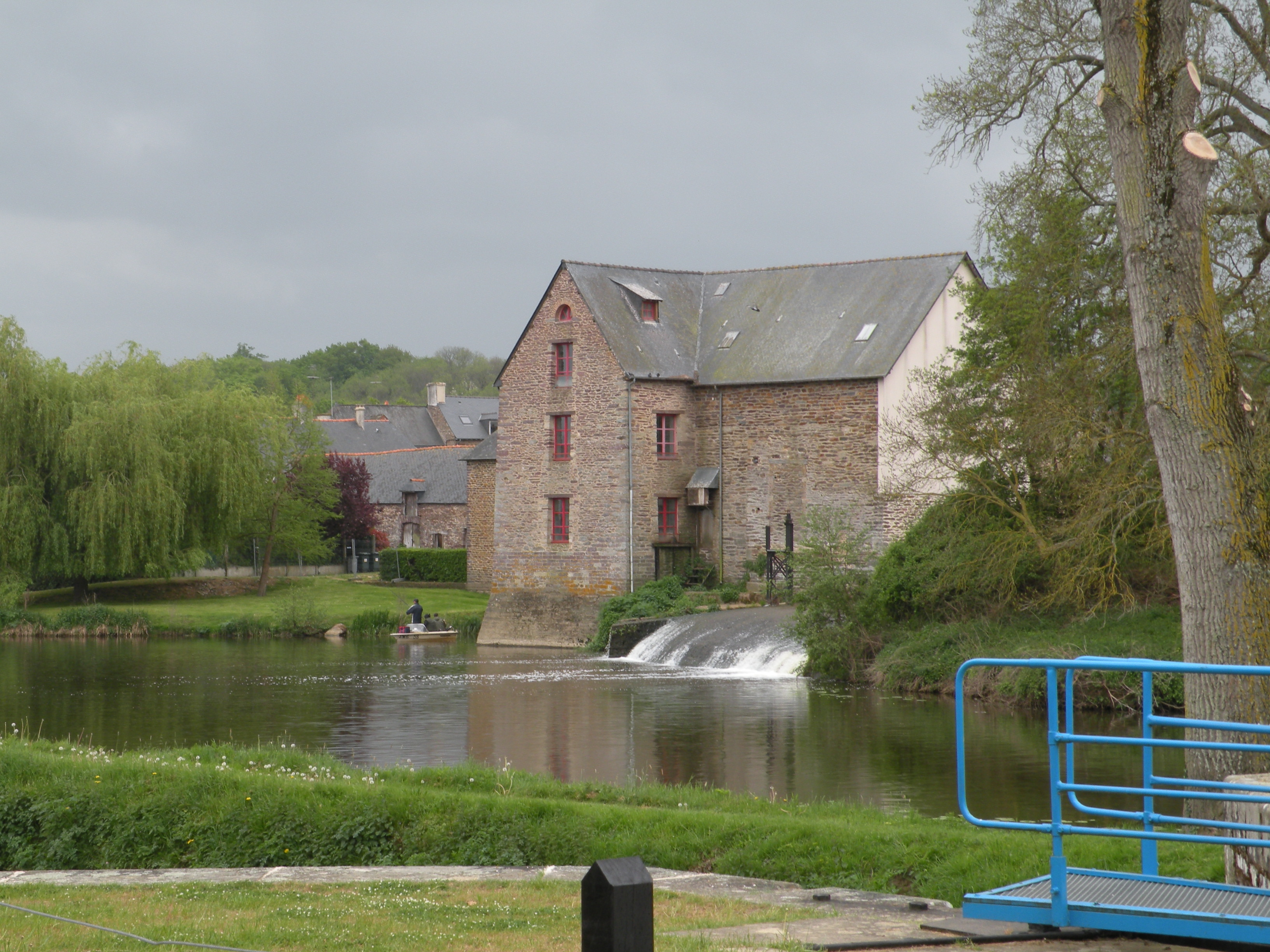 Moulin de Pont-Réan en Guichen, sur les bords de la Vilaine.